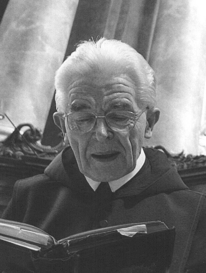 P. Benedikt Vojtěch (Adalbert) Gleißner OSB (řeholník opatství Braunau v Rohru), narozen 5. 4. 1927 Mariánské Radčice, řeholní sliby 11. 9. 1949 Rohr, vysvěcen na kněze 8. 7. 1956 Rohr, † 25. 11. 2015 Pattendorf, pohřben v Rohru